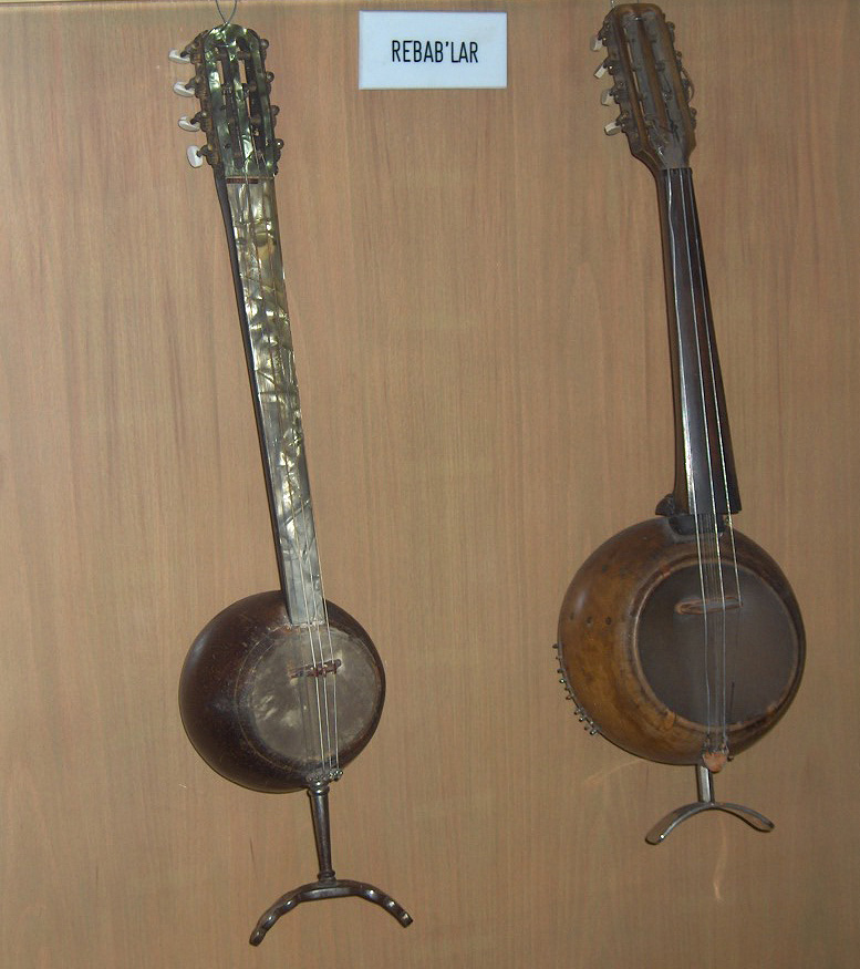 Rebab, Turkish musical instrument; Mevlâna mausoleum; Konya, Turkey